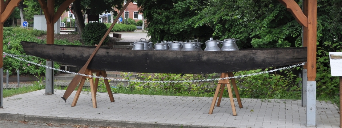 Bilder Ihlienworth 2012